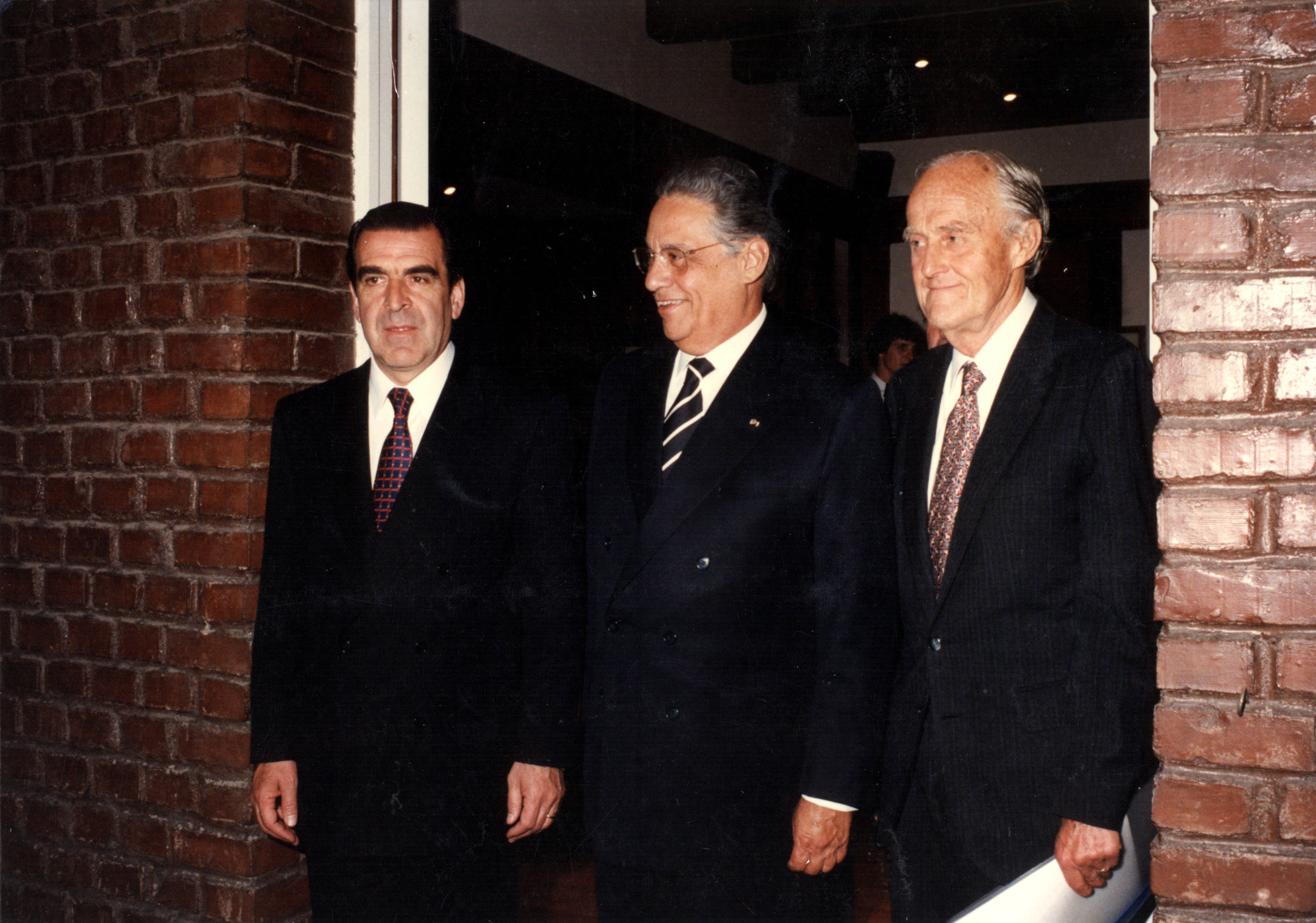 Edgardo Boeninger, junto al Presidente Eduardo Frei y el Presidente Fernando Cardoso, durante la celebración PECC XII.